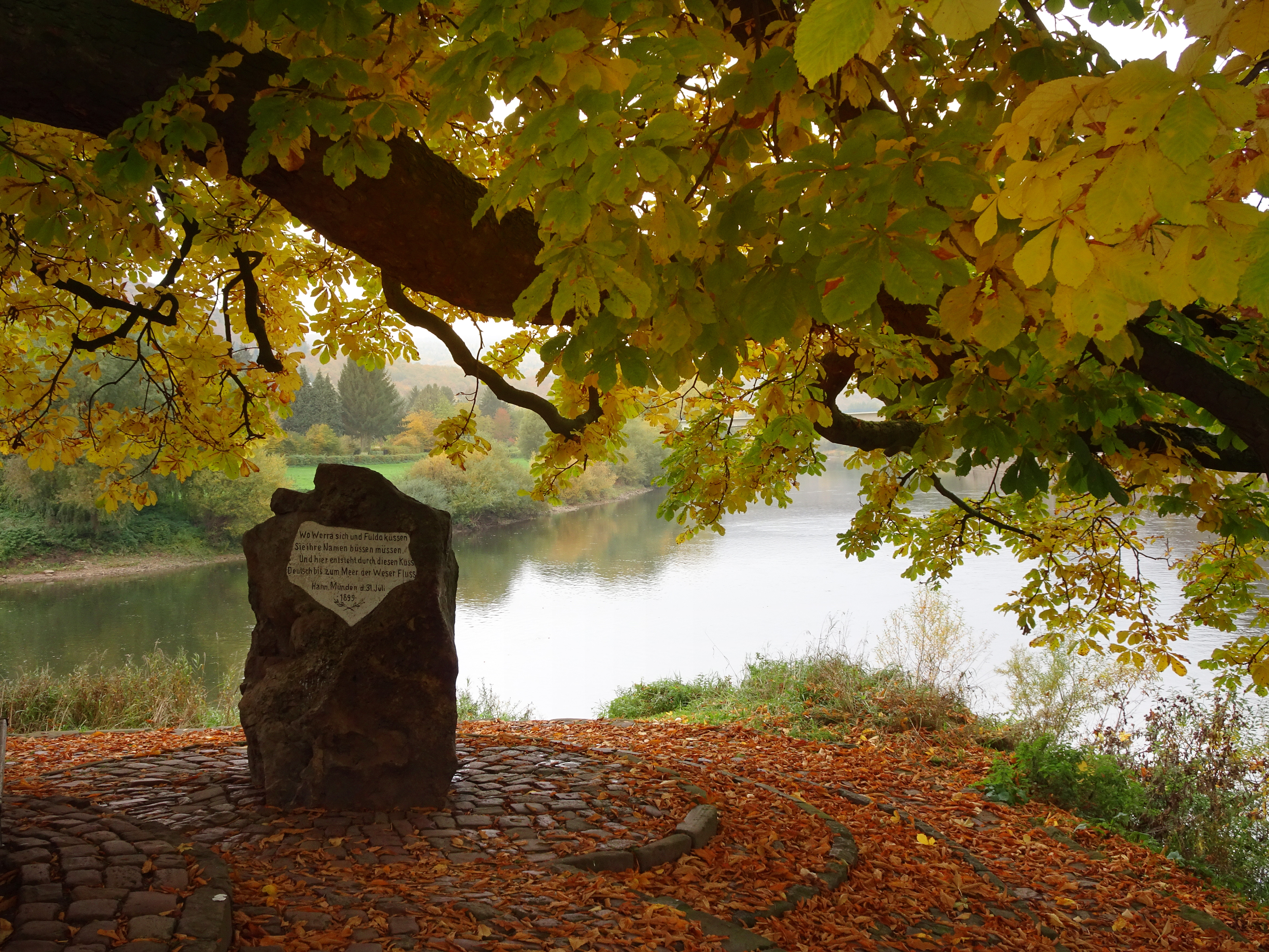 "Wo Werra sich und Fulda ..." Der Weserstein von 1899 in Hann. Münden, im südniedersächsischen Landkreis Göttingen